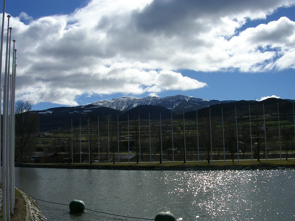 Parc olímpic del Segre a la Seu d'Urgell amb vistes de la Serra del Cadí